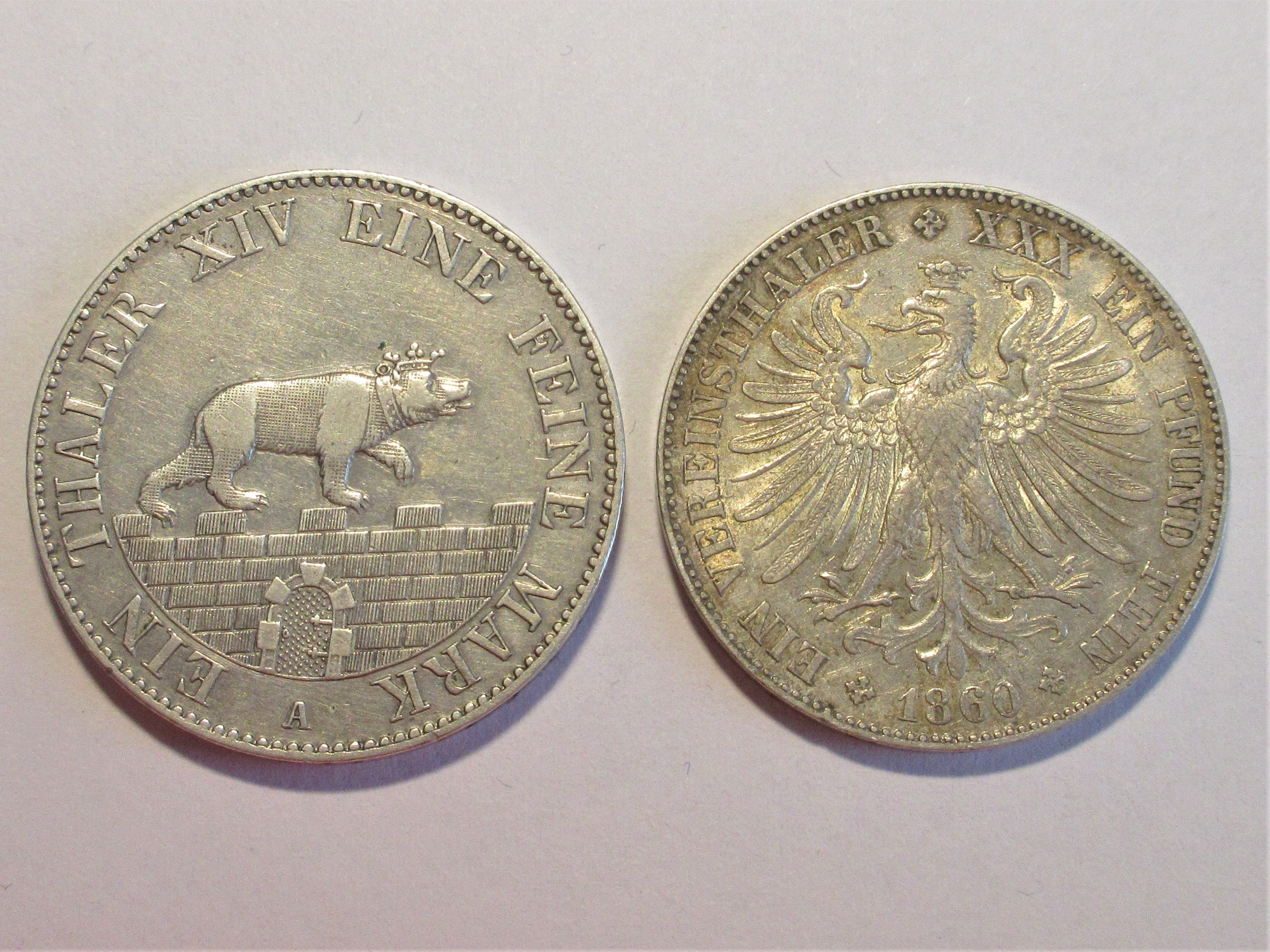 14-Talerfuß aus der Kölner Mark und 30-Talerfuß aus dem Zollpfund auf zwei Talern